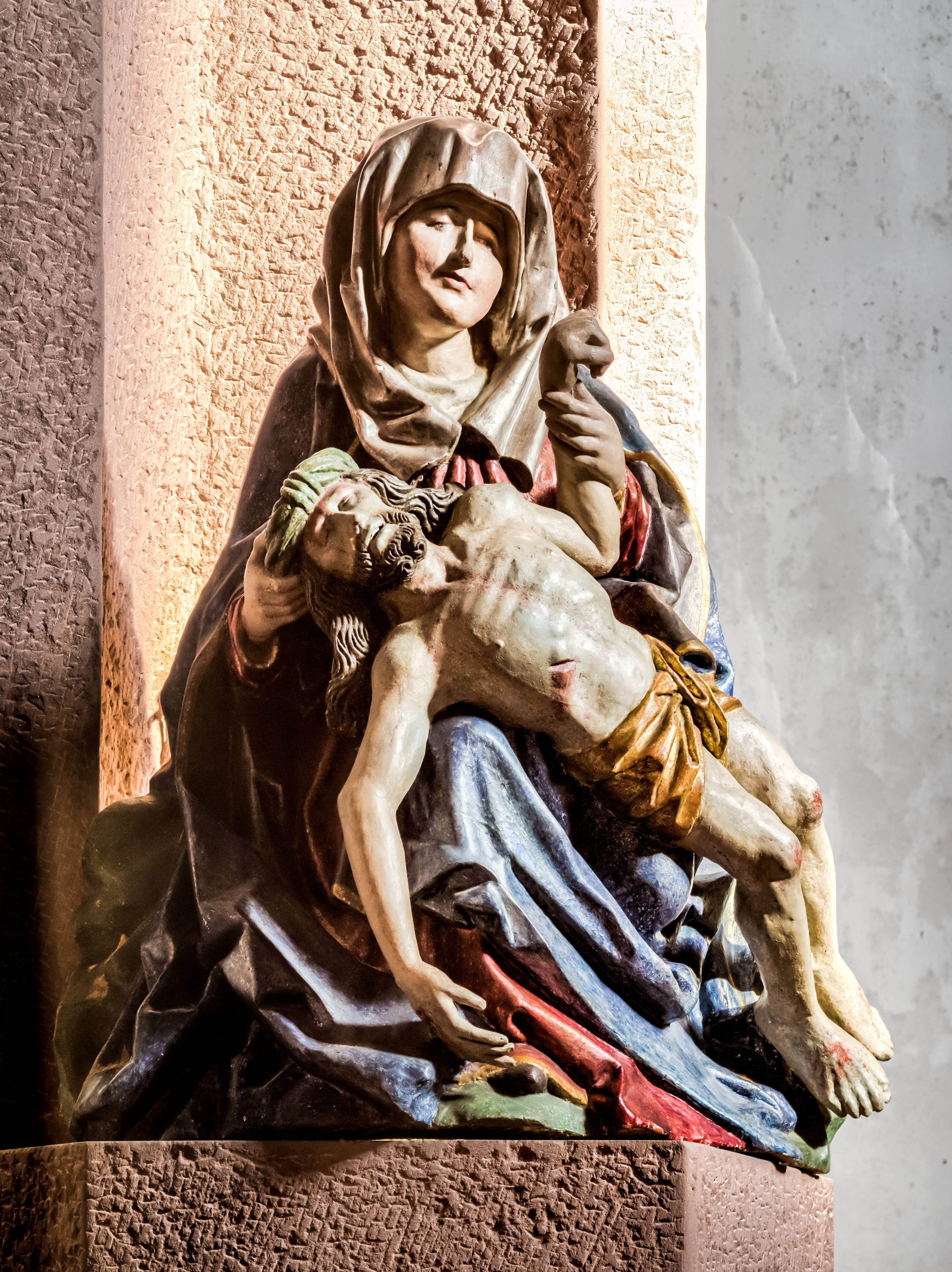 Die katholische Kirche St. Blasius im Glottertal Pieta im Chor